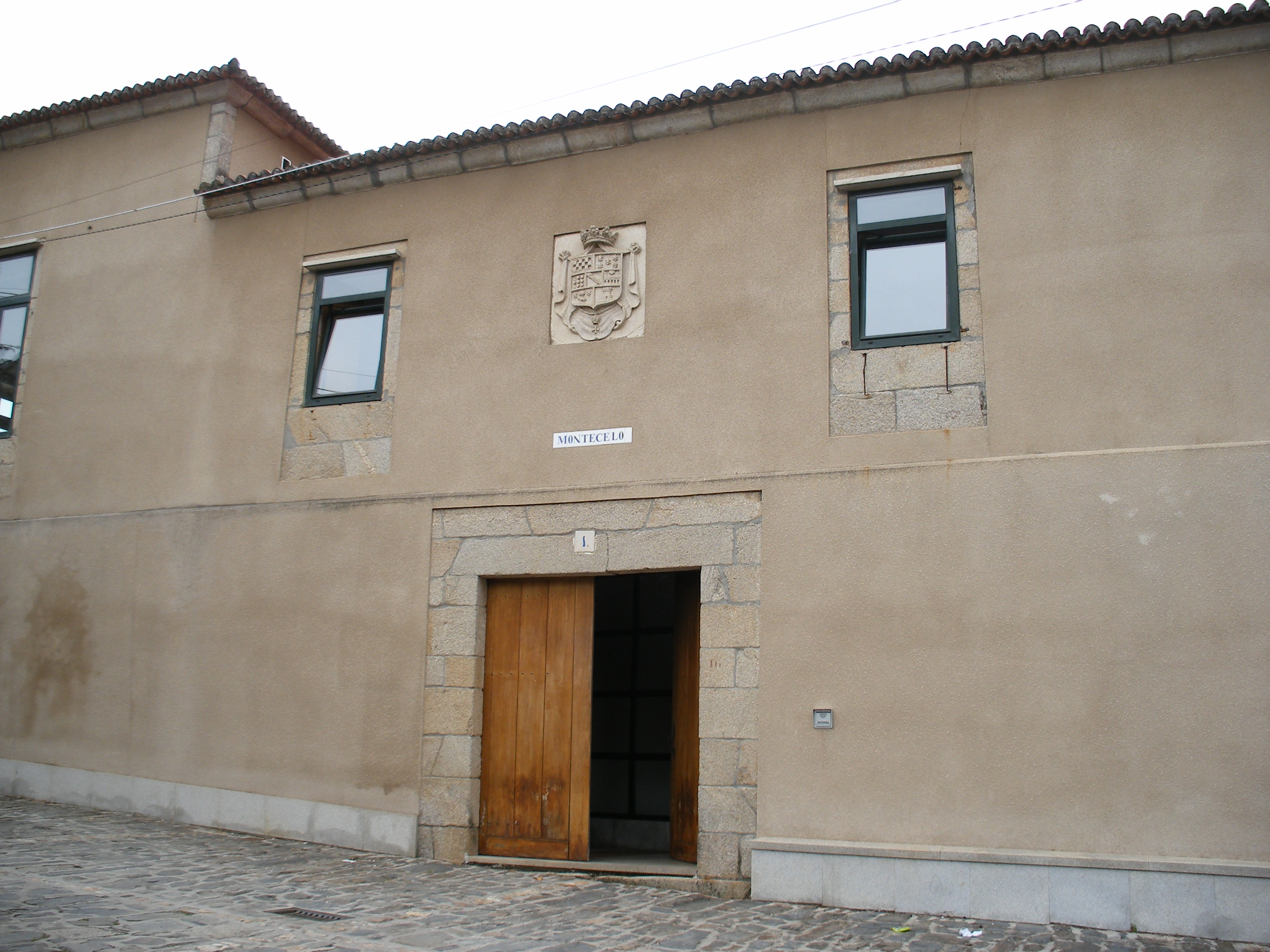 Pazo de Montecelo en San Pantaleón das Viñas, no concello de Paderne.